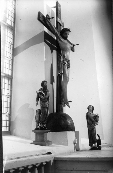 Triumkrucifix och skulpturer. Före behandling 1961. Kategori: (05) SkulpturerTriumkrucifix och skulpturer. Före behandling 1961.